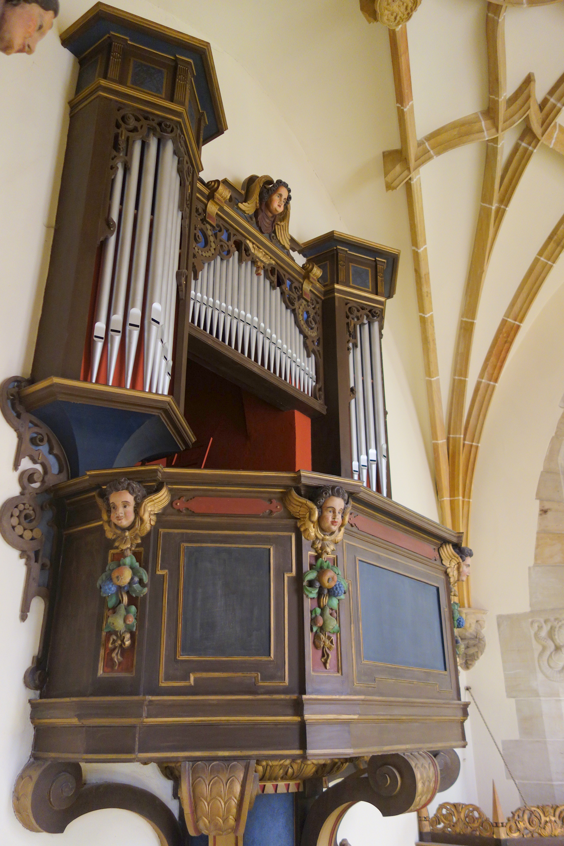 Kapelle Veste Coburg, Bayern, Deutschland